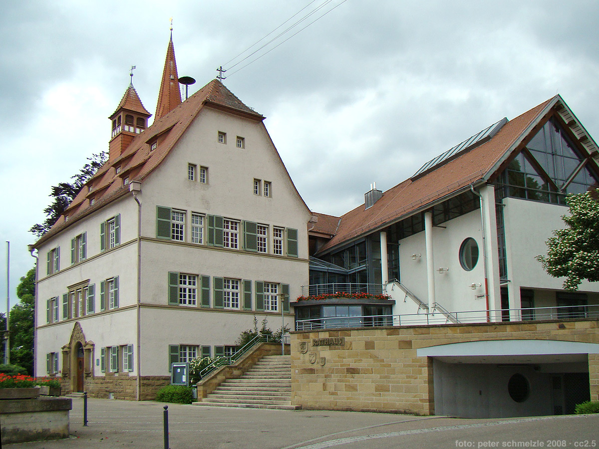 Rathaus von Ilsfeld, Altbau erbaut nach dem Stadtbrand von 1904, Erweiterungsbau von 1993